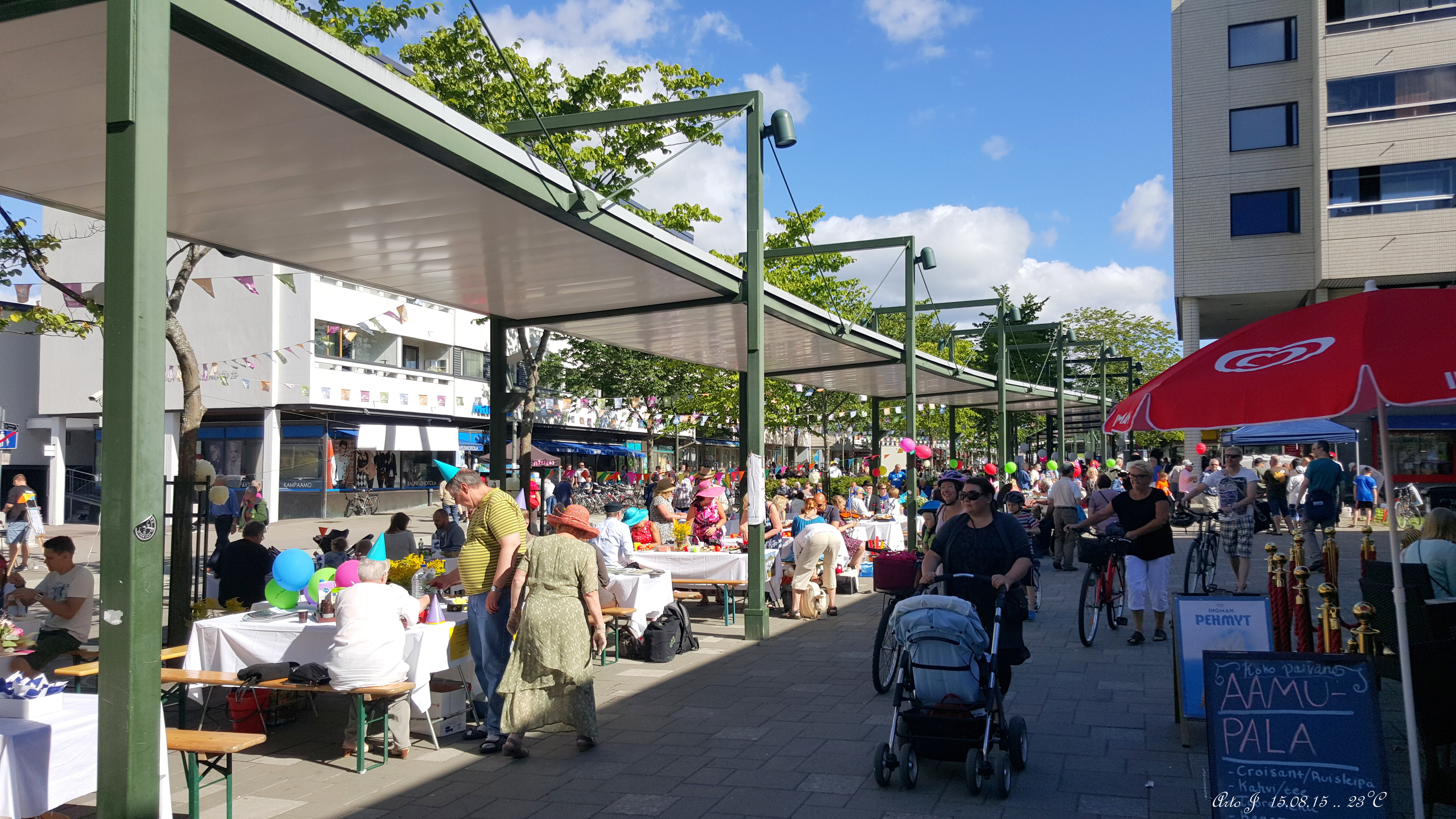 Jarvenpaa Celebrating ... Jean Sibelius